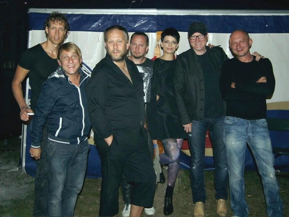 Varius Manx.